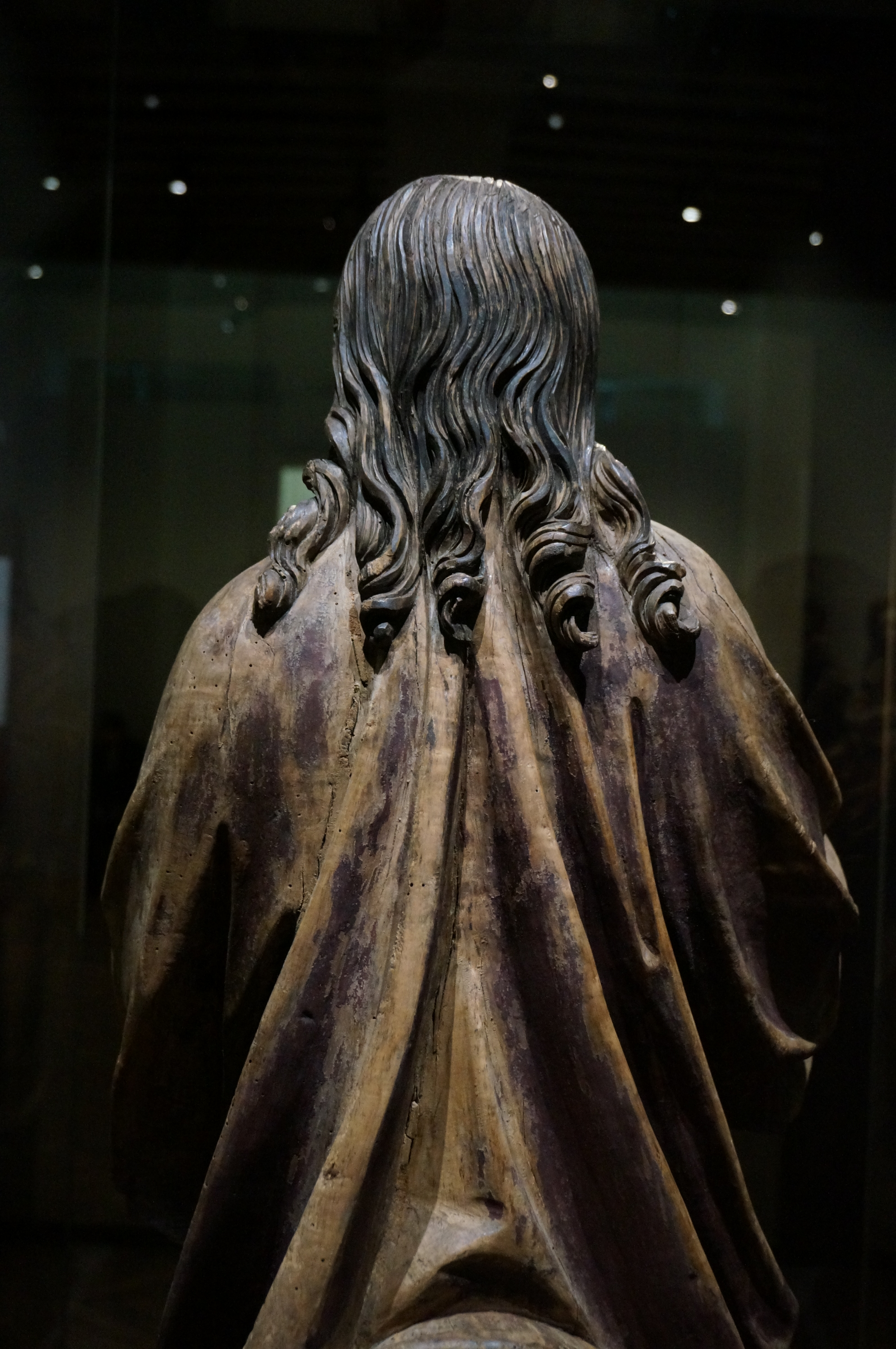 détail du "Christ des Rameaux", Louvre.